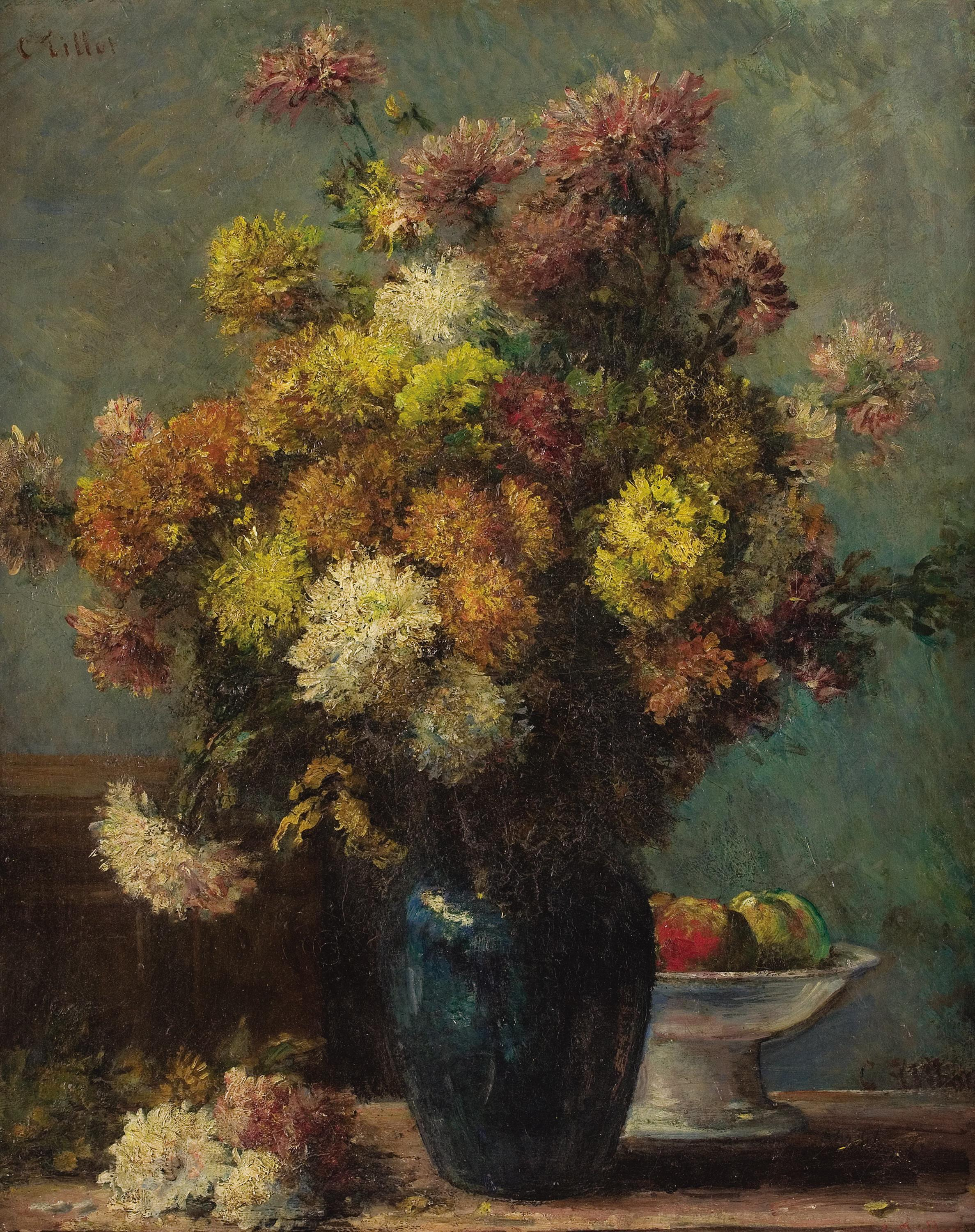 Cuadro del pintor francés Charles Tillot: Bodegón con flores, Nature morte aux fleurs, Floral Still Life